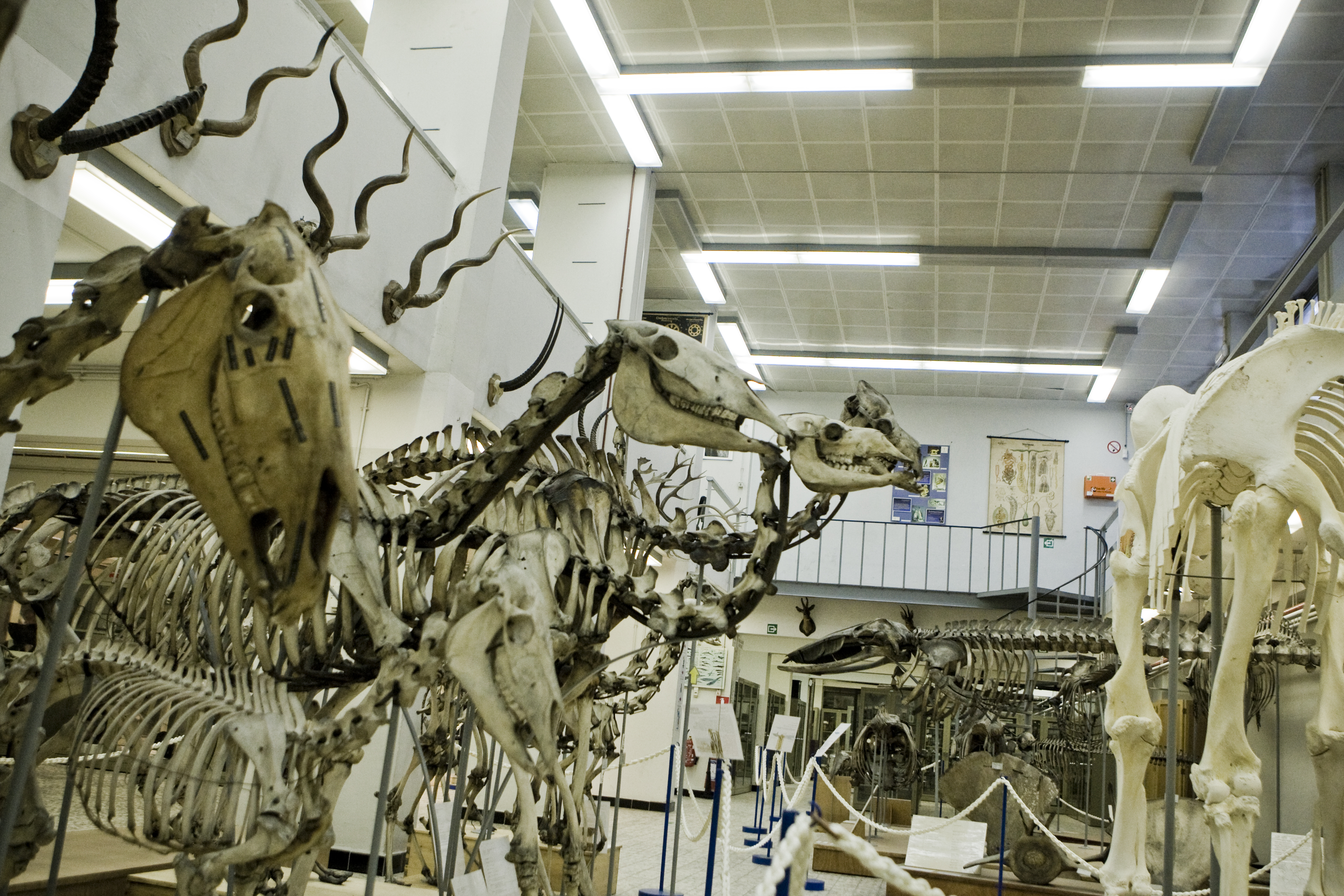 Foto van Museum voor Dierkunde - Universiteit Gent. Foto gedoneerd door UGentMemorie; fotografie Pieter Morlion